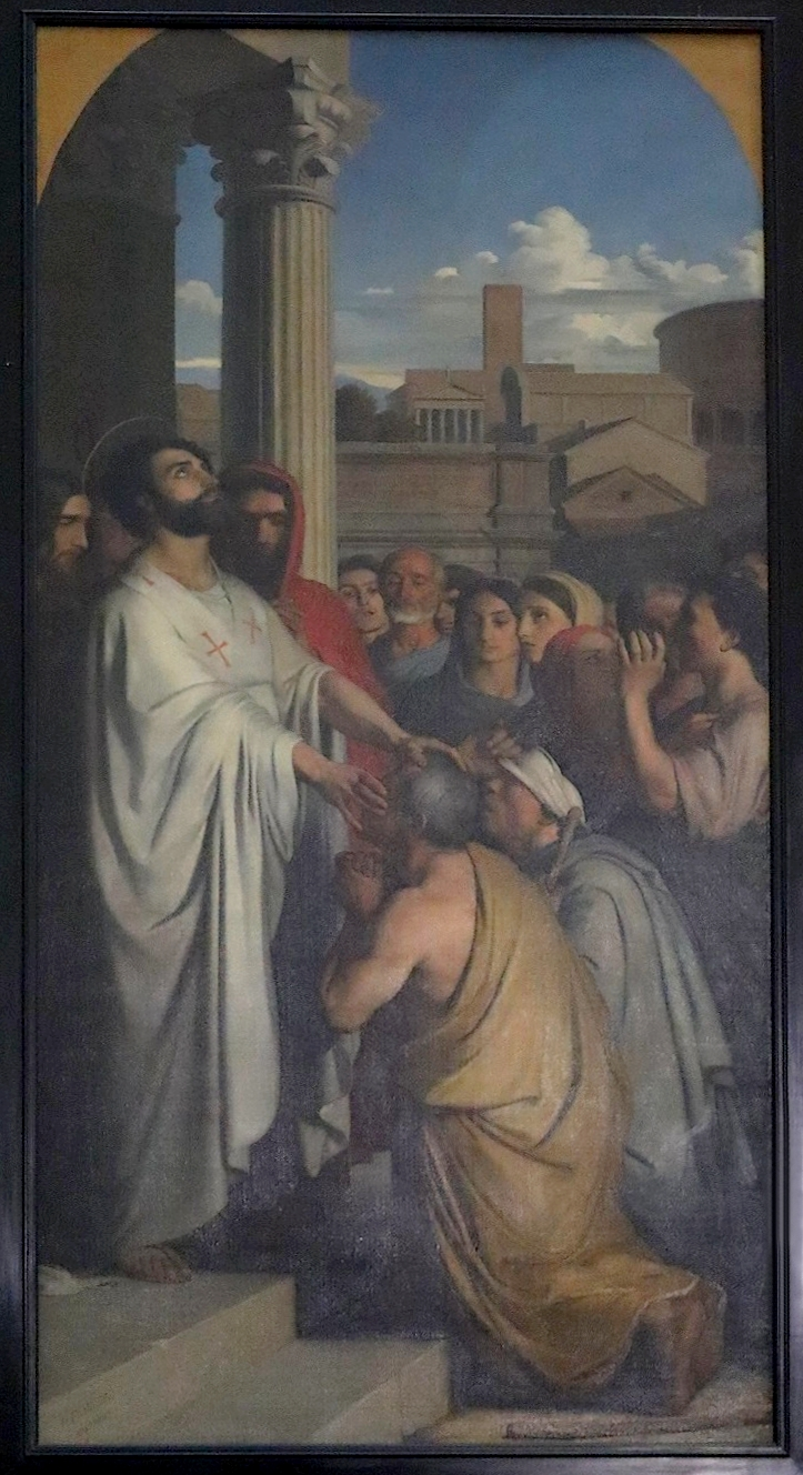 Saint Clair, premier évêque de Nantes, guérissant les aveugles par Hippolyte Flandrin en la cathédrale Saint-Pierre et Saint-Paul de Nantes (44. Le tableau a été détruit lors de l’incendie de la cathédrale le 18 juillet 2020.